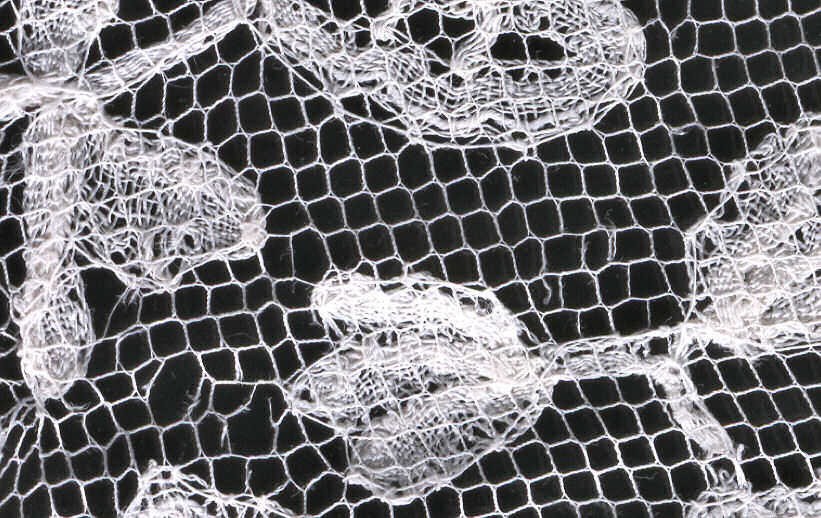 private collection